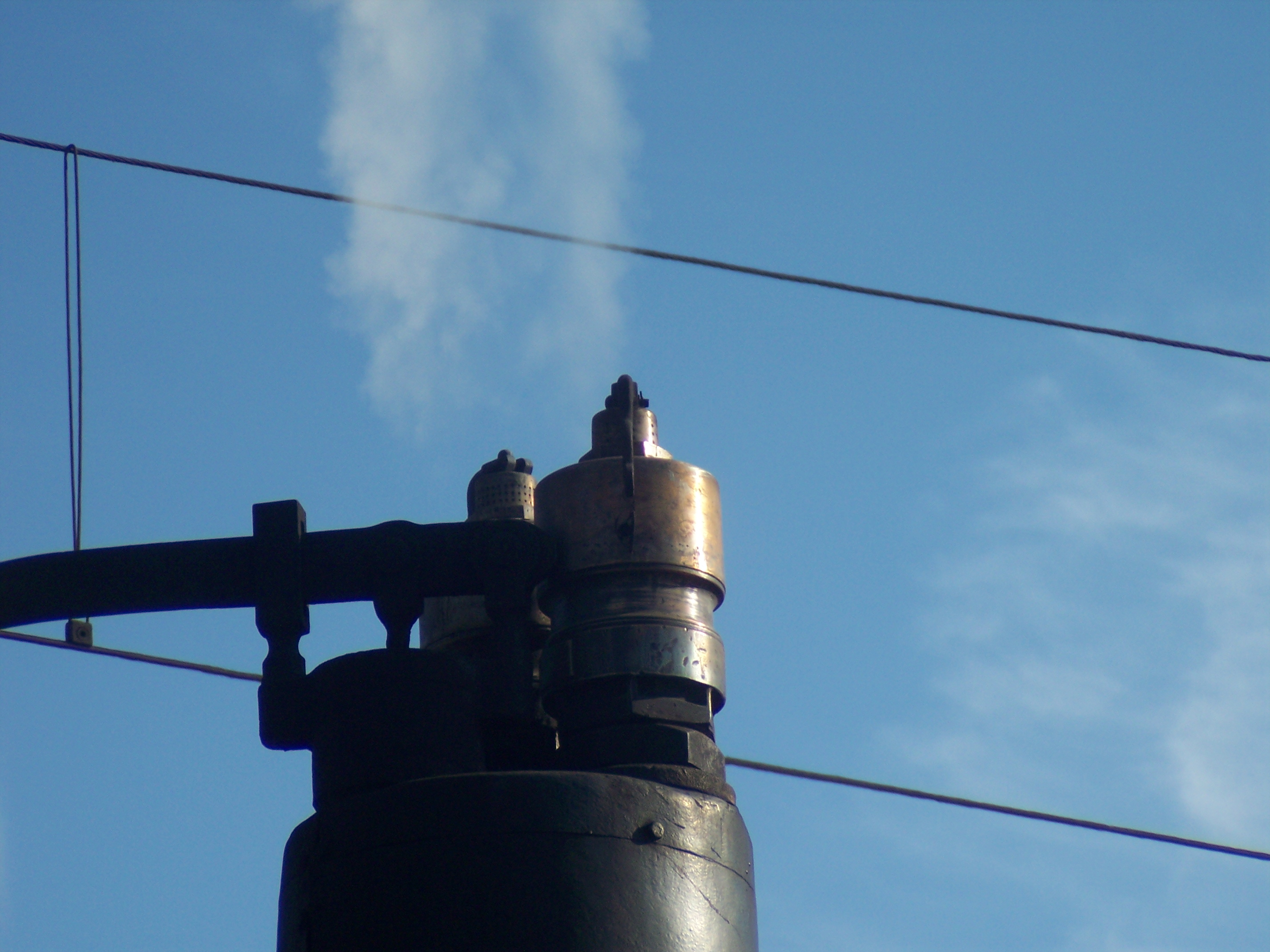 Valola coale della 740.038 ... in azione Steam valve of 740.038 steam locomotive (1906)